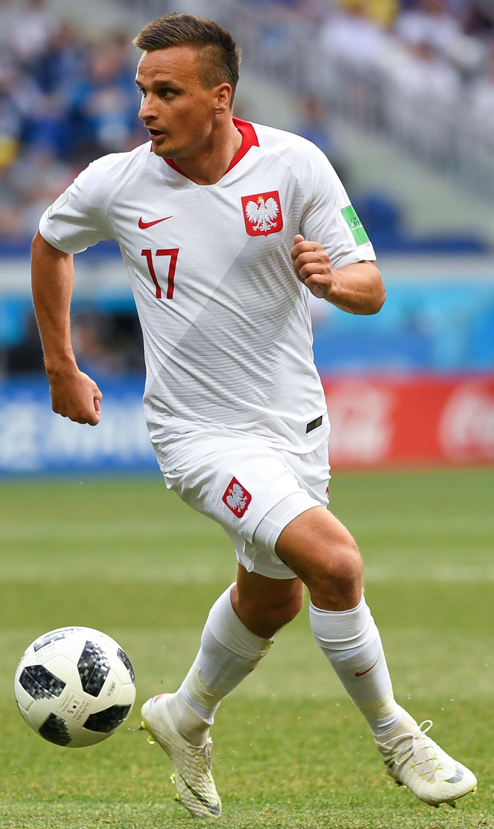 Япония проиграла Польше, но вышла в плей-офф